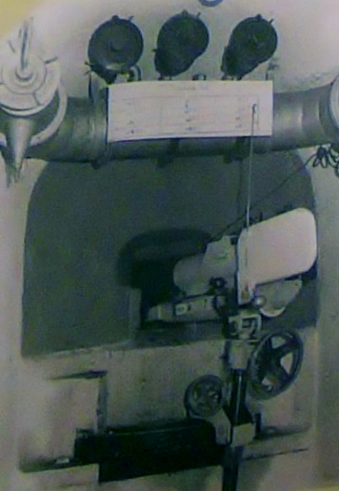 Il cannone 90/32 all'interno di una camera da combattimento. In alto si può vedere la tabella con i vari settori di tiro